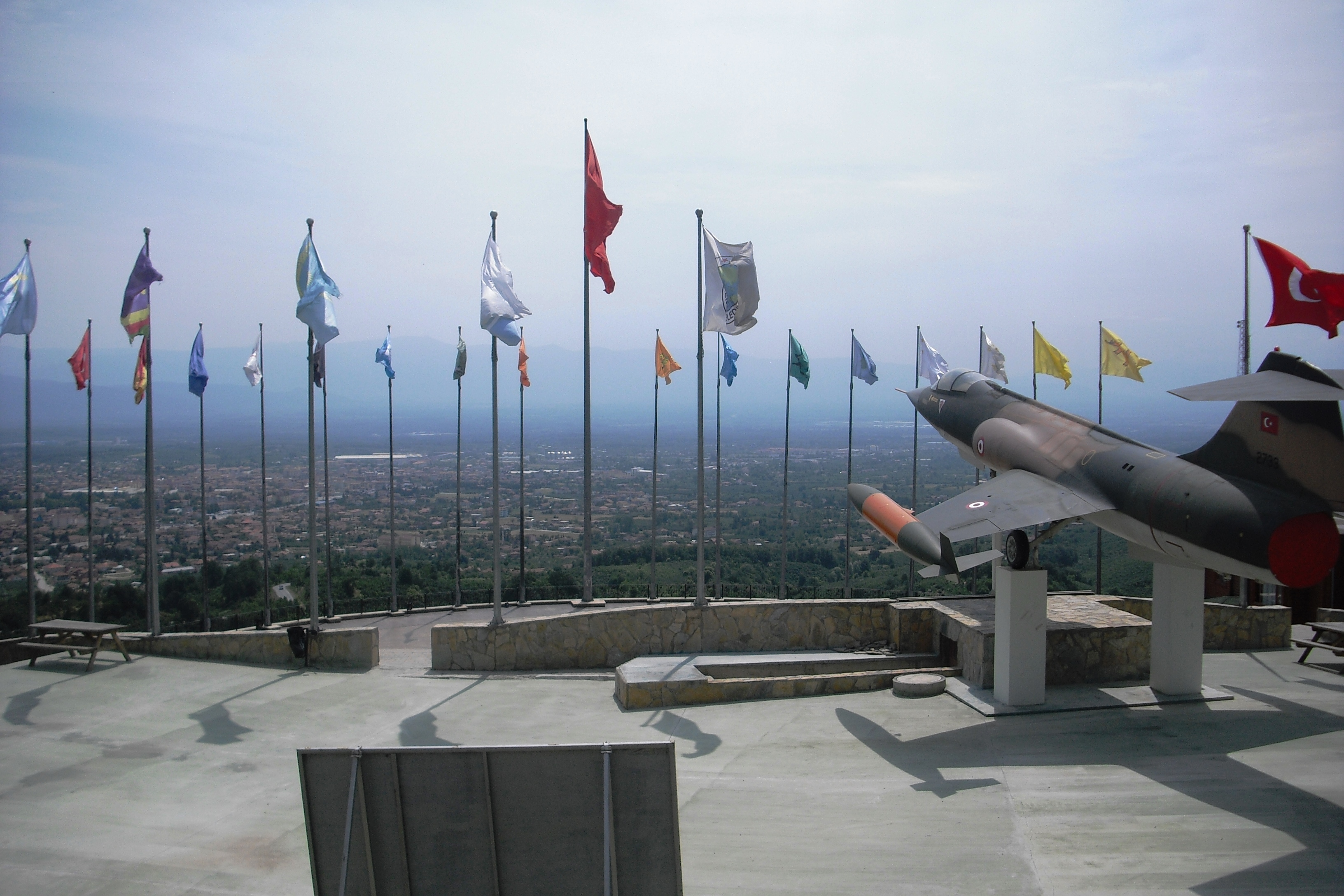 Hendek Çamdağı üzerindeki Byraktepe.